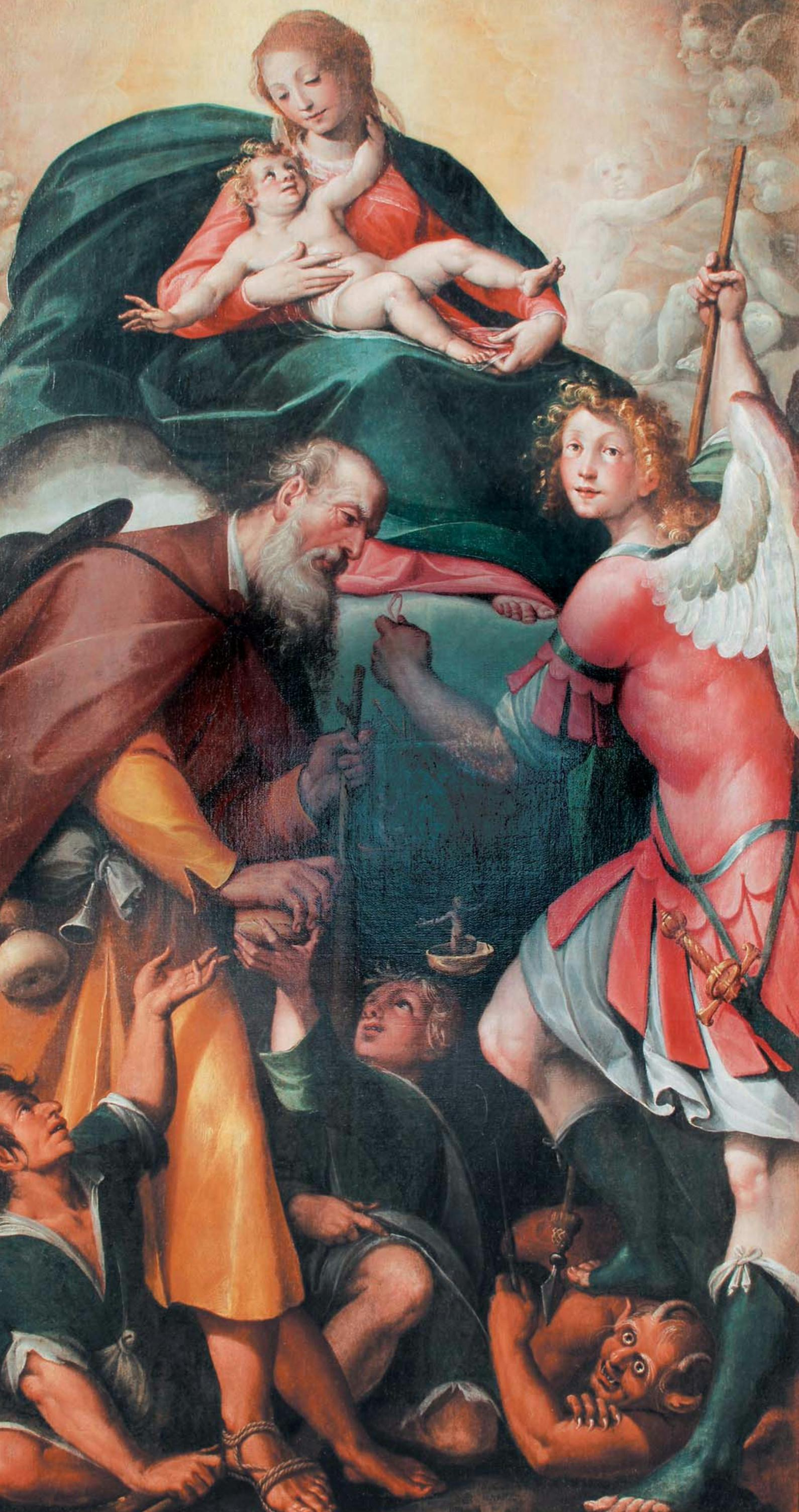 Olio su tela rappresentante San Miro, l'Arcangelo Michele e la Vergine. Autore Fiammenghino anno 1616